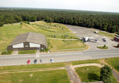 Ju 52 Museum der Traditionsgemeinschaft Lufttransport Wunstorf e.V. - Ansicht des Museumsgeländes